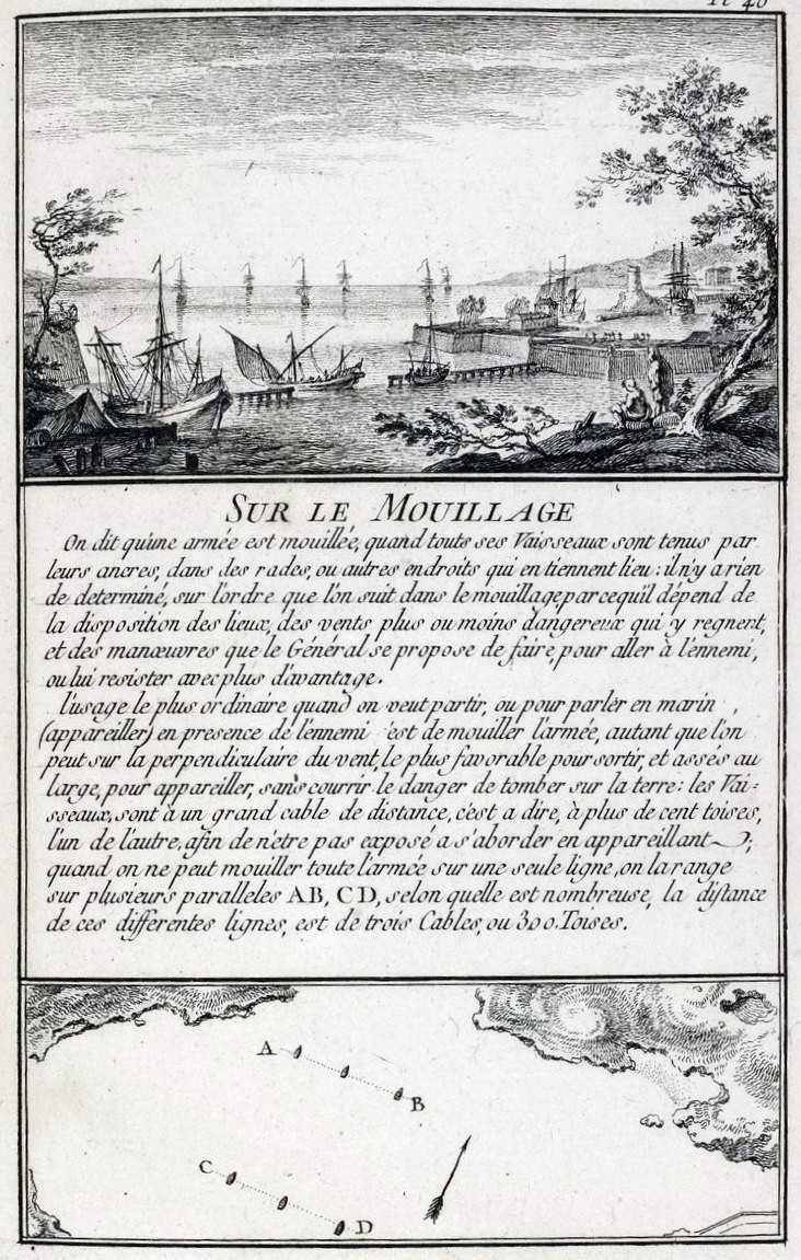 Définition du terme de mouillage pour une flotte de guerre vers 1760-1765. Extrait de Marine militaire, ou Recueil des différents vaisseaux qui servent à la guerre, suivis des manœuvres qui ont le plus de rapport au combat ainsi qu'à l'attaque et la défense des ports, par Ozanne l'aîné.